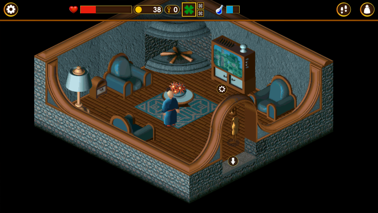 Capture d'écran du jeu vidéo Little Big Adventure, ici dans son portage pour appareils mobiles (2014).